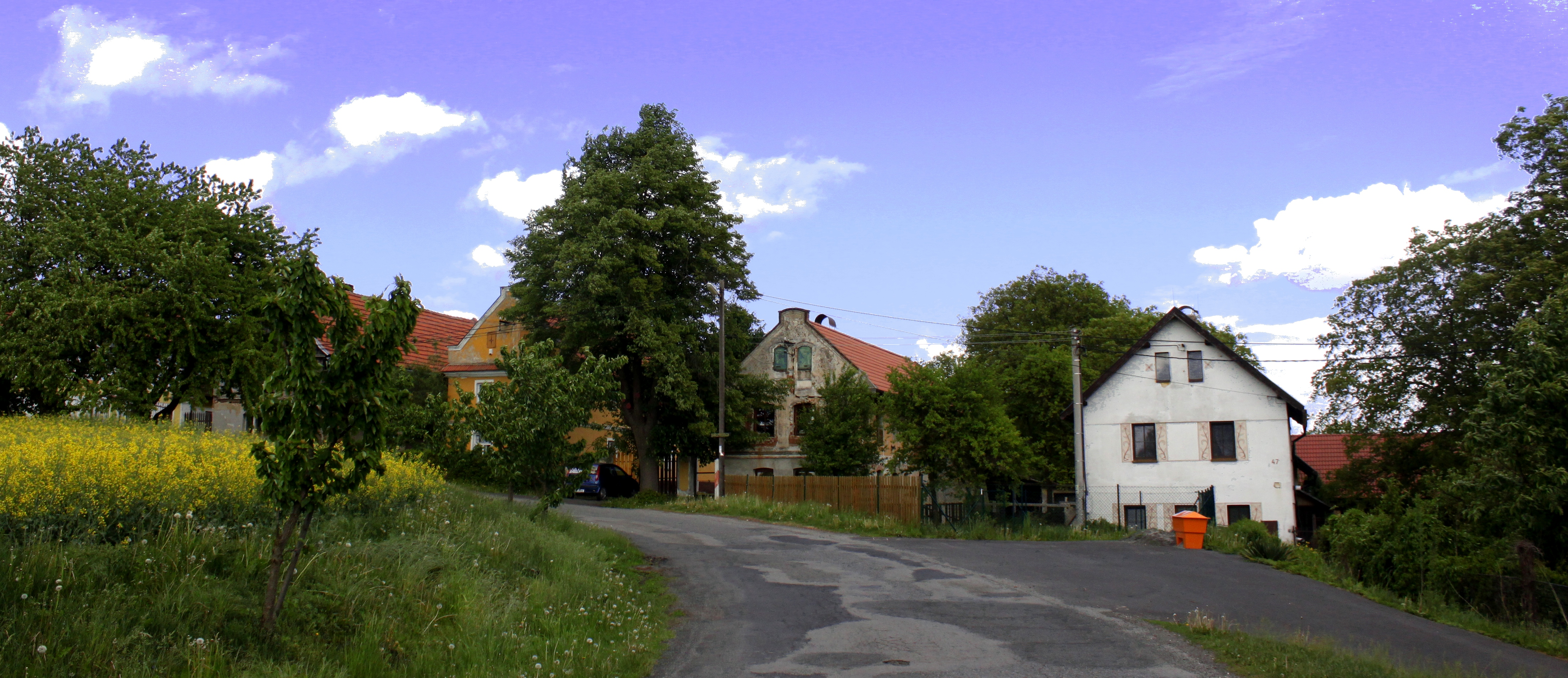 Vesnice Šemanovice, část obce Kokořín, Česká republika Project: Fotíme Česko.